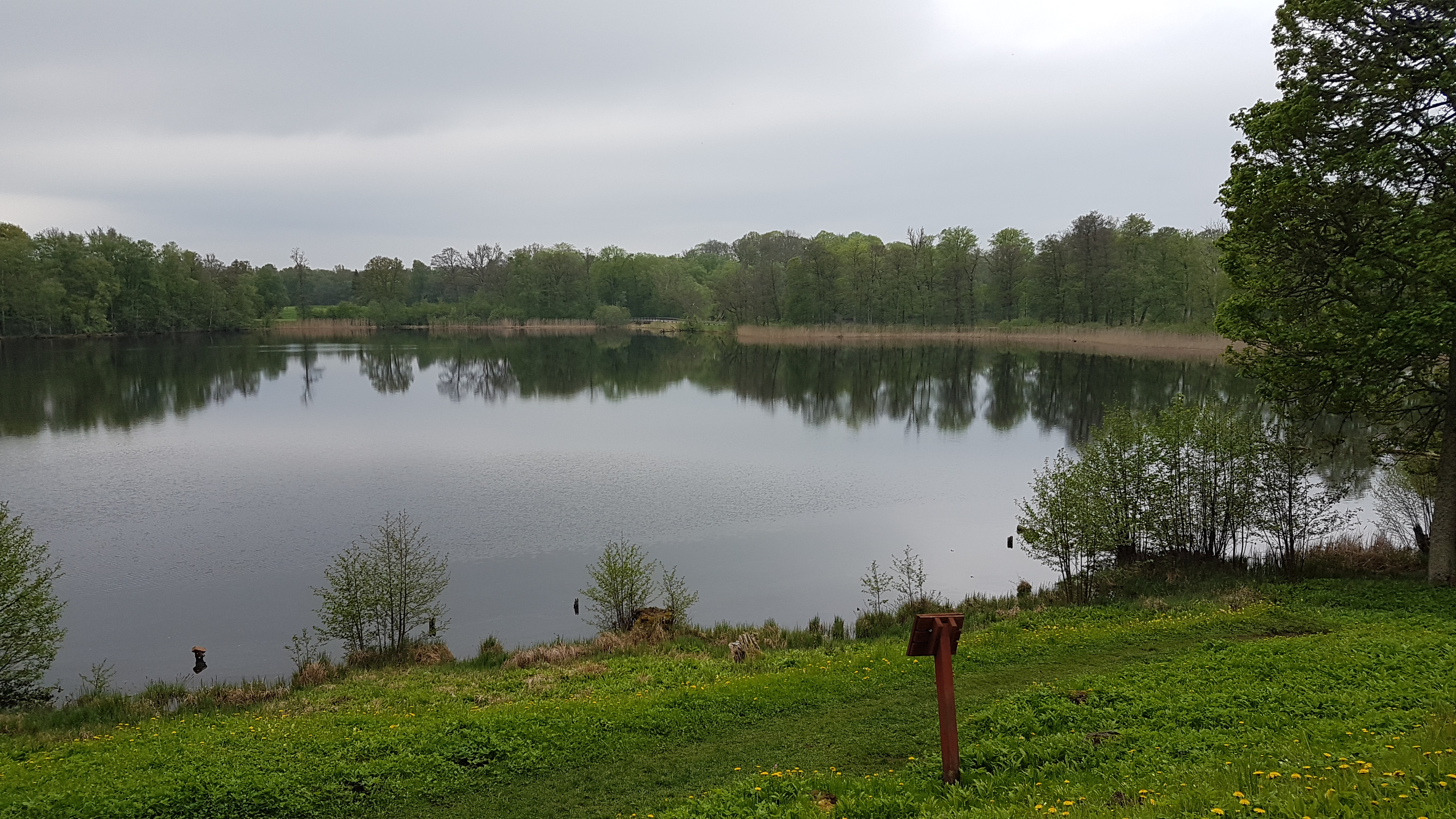 Höjentorp Drottningkullens naturreservat.